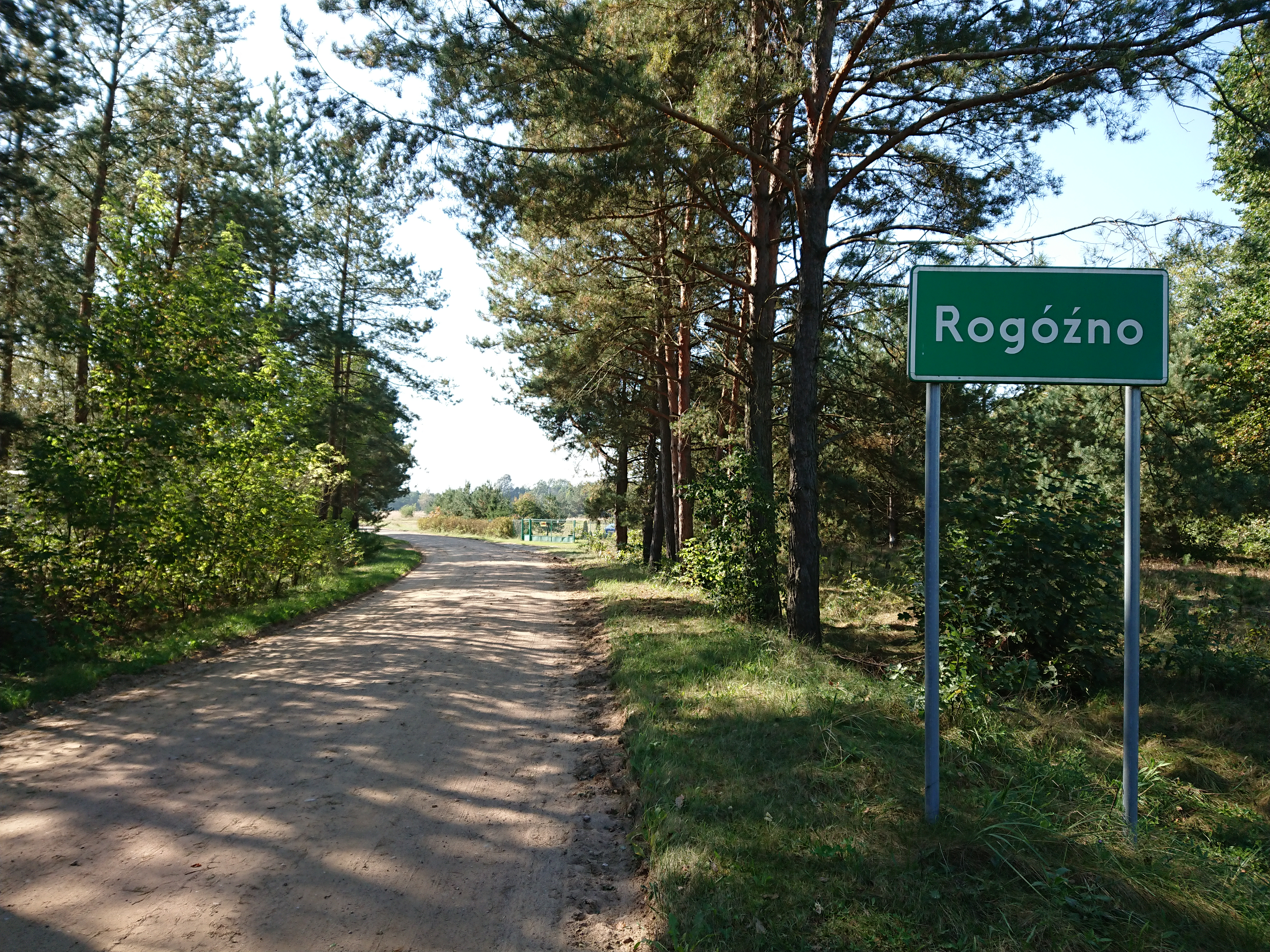 Wjazd do Rogóźna (gmina Rząśnik)